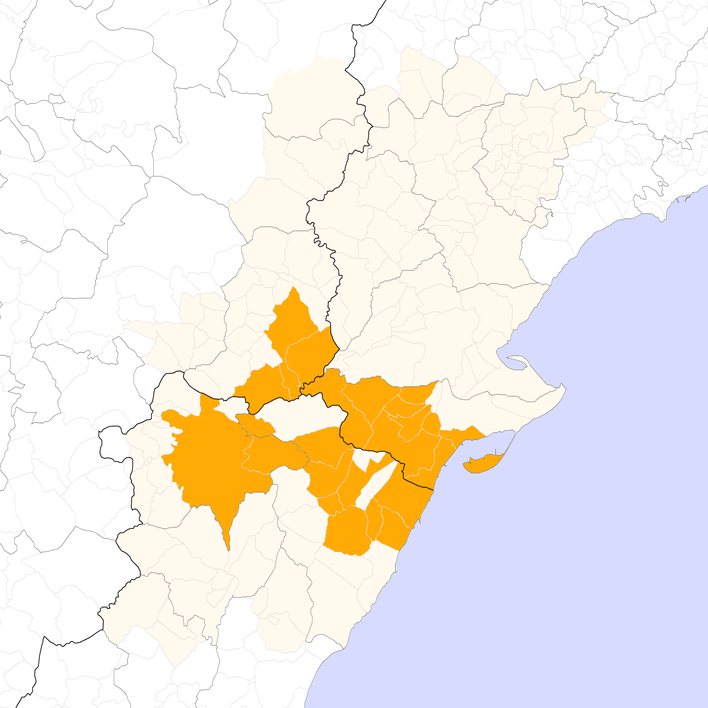 Municipis que integren la Taula del Sénia.